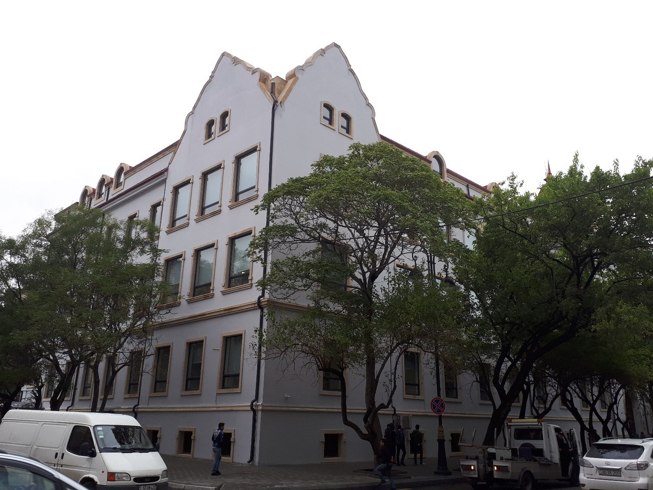 Третий корпус АГУНП, где расположен UFAZ.